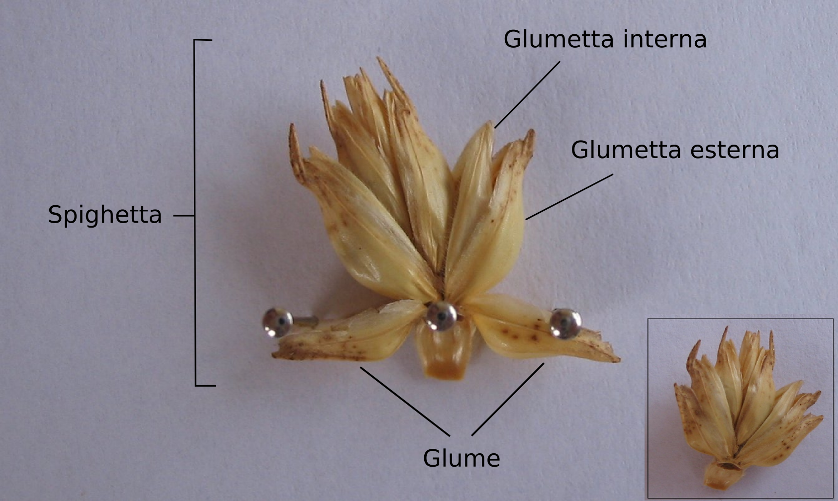 Spighetta di grano (Triticum aestivum) con le glume e le glumette messe in evidenza